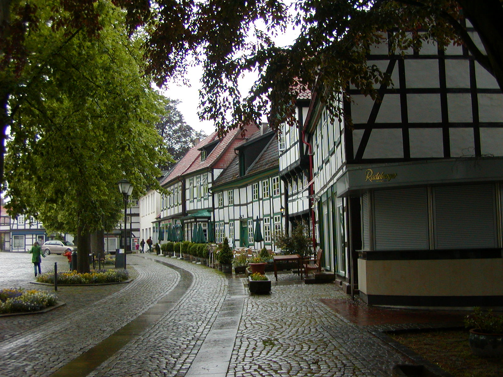 Häuserzeile am Kirchplatz in Bad Essen